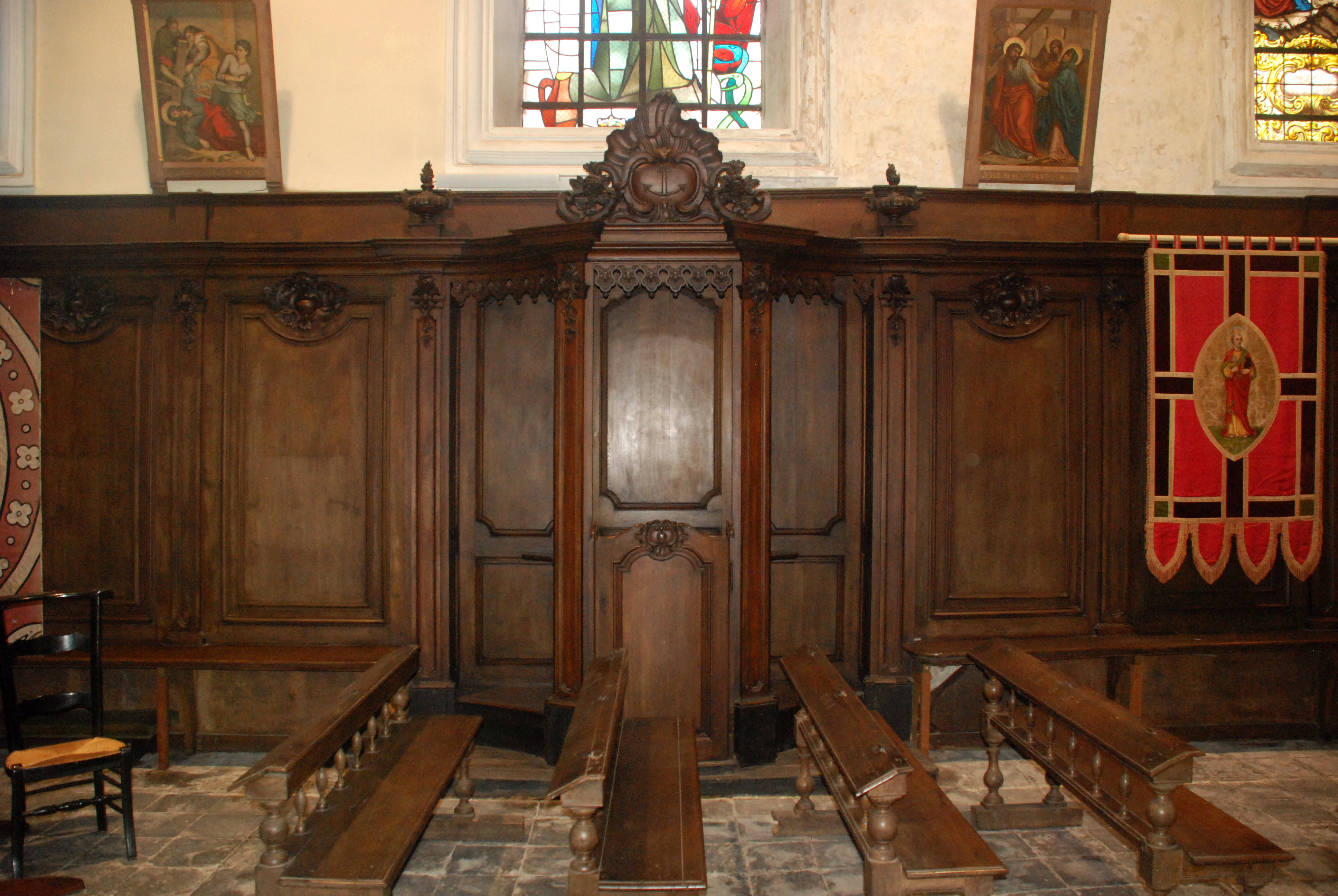 Belgique - Brabant wallon - Église Saint-Martin de Ways